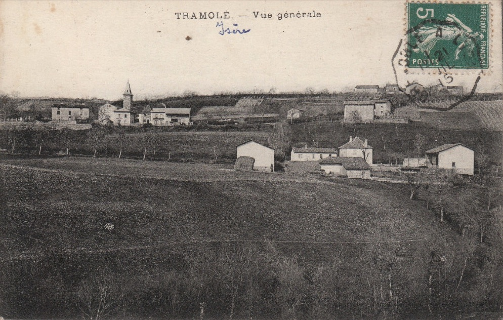 carte postale ancienne. Vue générale de Tramolé, Isère, France.